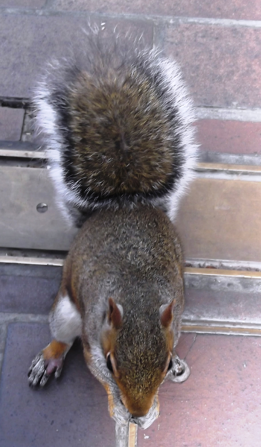 سنجاب رمادي شرقي في باربيكان سنتر بلندن.